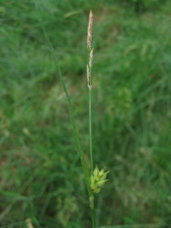 Männlicher Teilblütenstand der Behaarten Segge Carex hirta, Weißer See, Mecklenburg Vorpommern